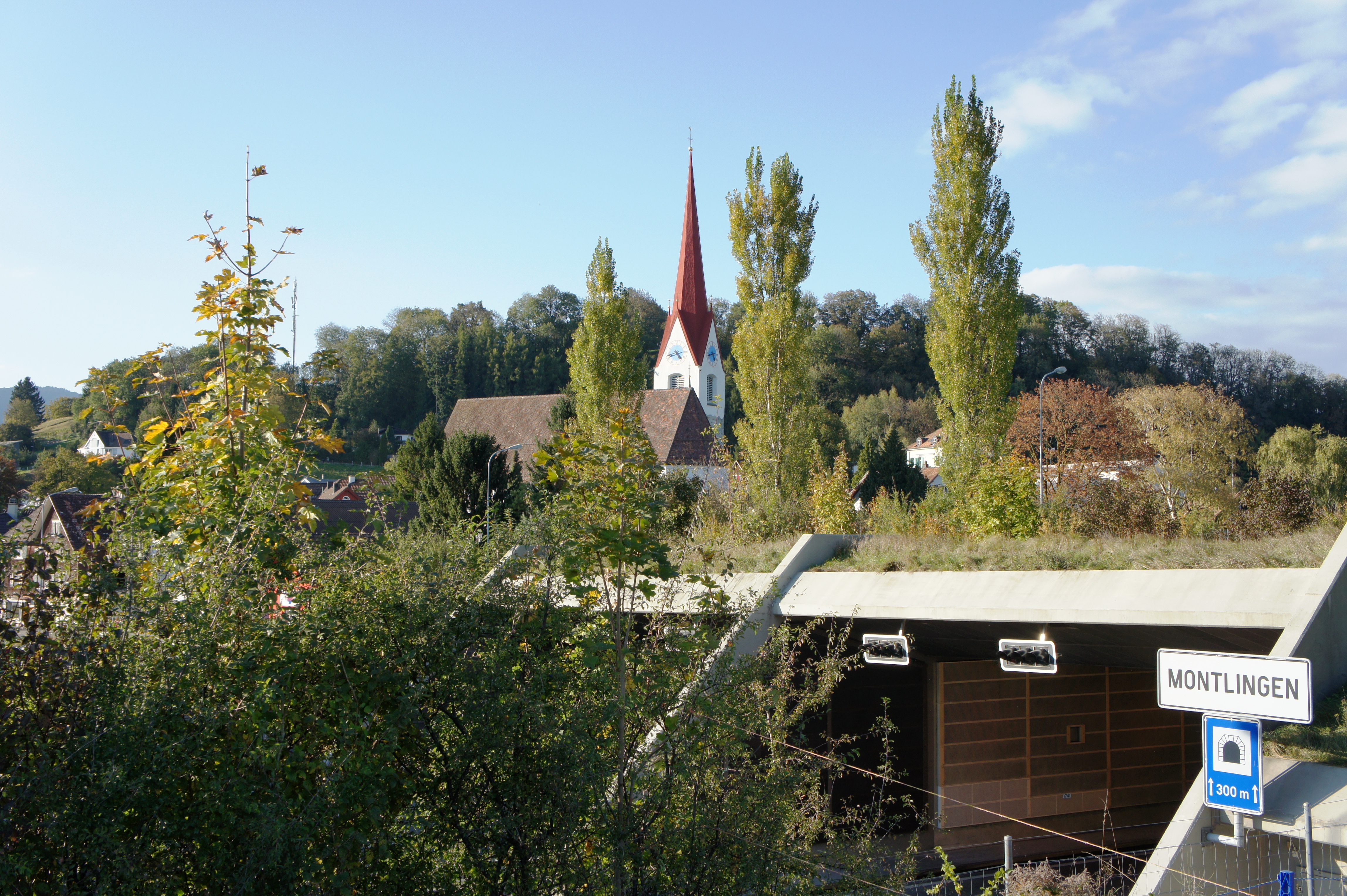 Die Pfarrkirche Montlingen aus südöstlicher Richtung, im Hintergrund der Montlingerberg, im Vordergrund das Südportal des Autobahntunnels der A13